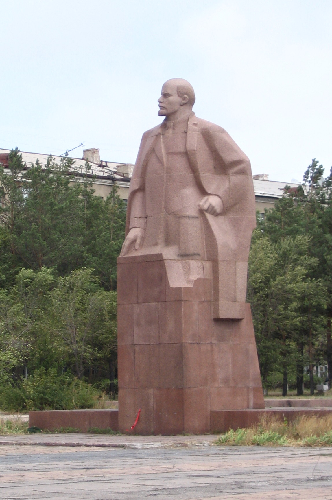 Памятник Ленину в Караганде. на проспекте Бухар Жирау (быв. советский, быв. сталина).